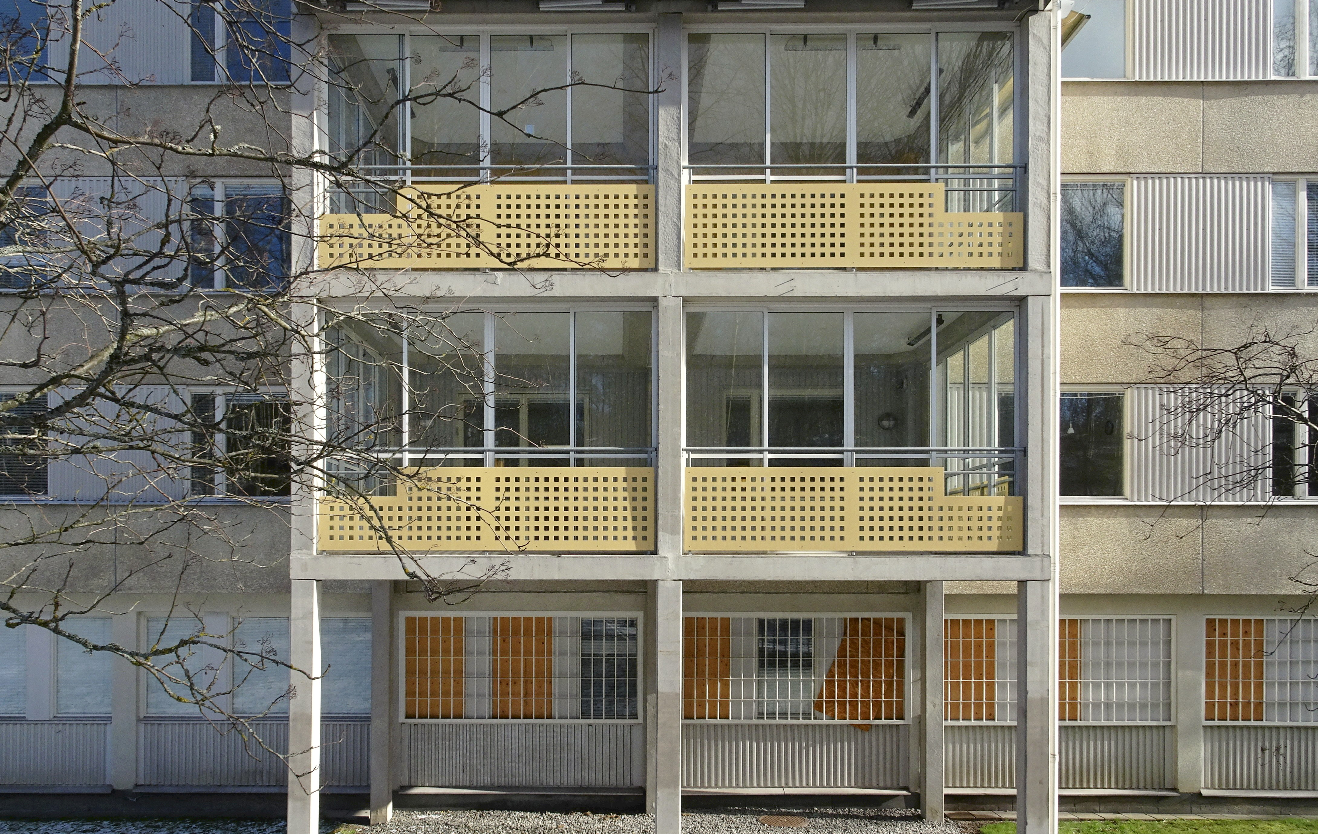 Vårbergs sjukhem byggdes 1970 som ett sjukhus, ritat av arkitekten Ervin Pütseps arkitektkontor. 1994-1996 byggdes det om till ett sjukhem för äldre med den verksamheten avvecklades 2010.